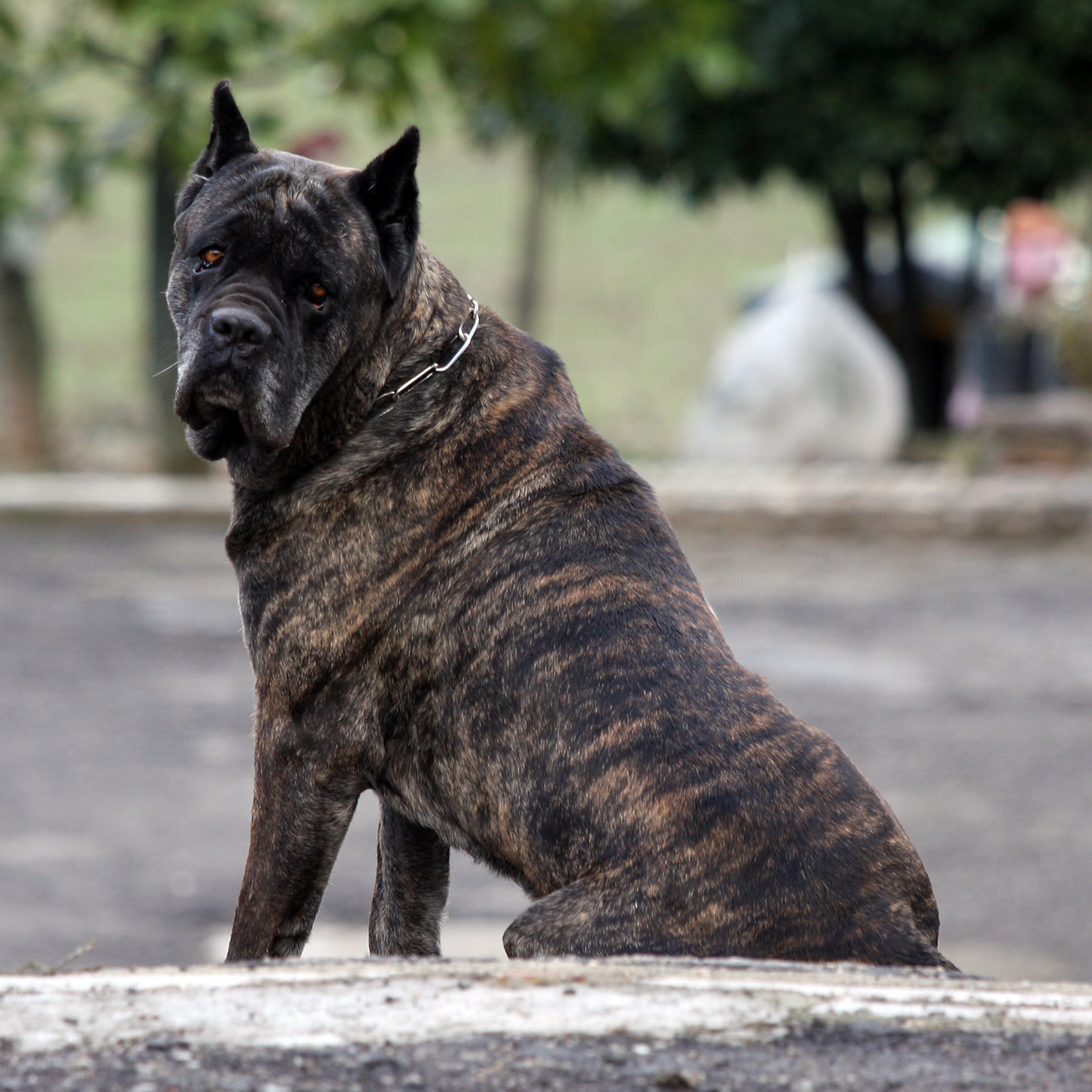 Guiglia (MO)